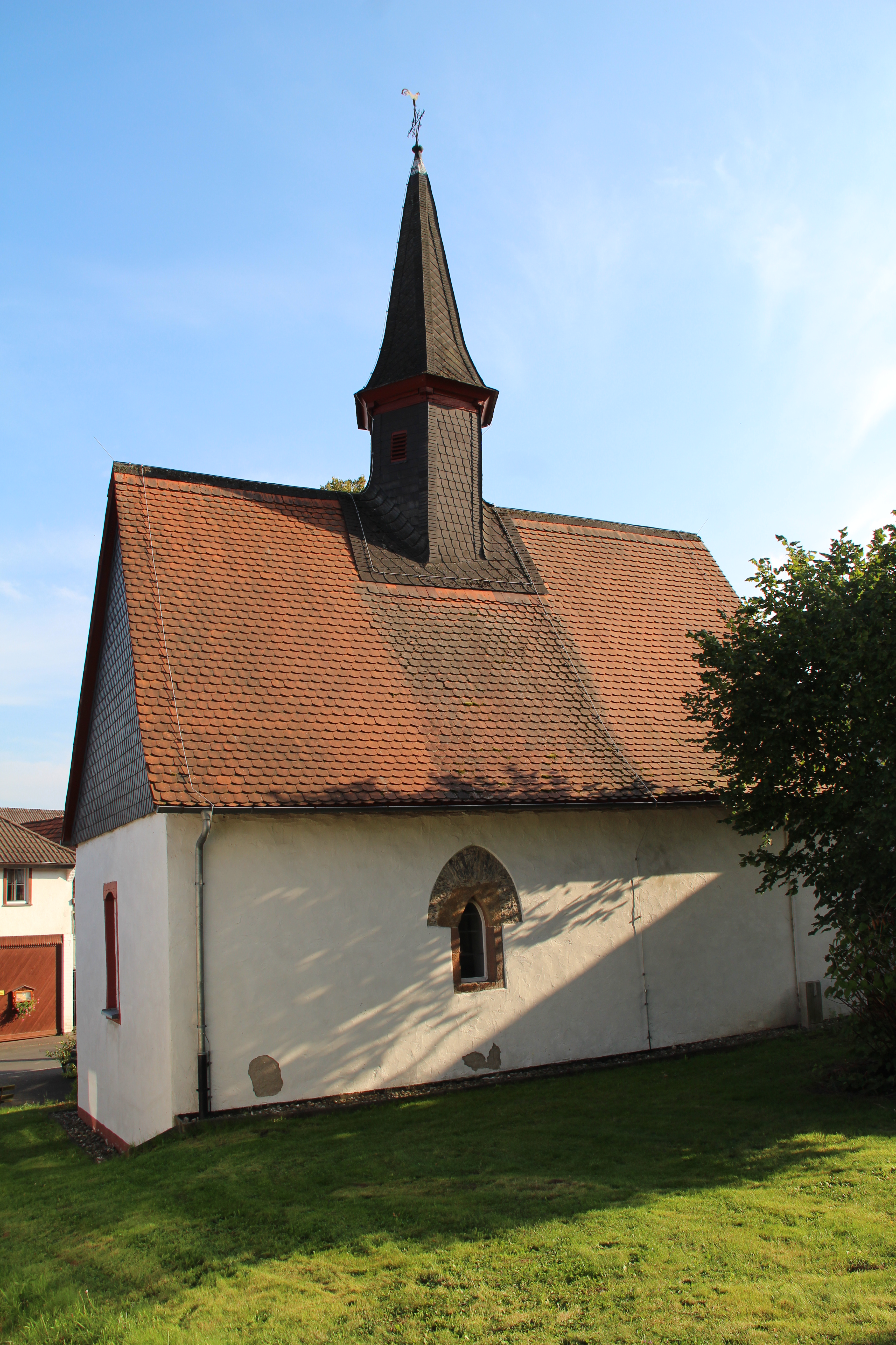 Beltershain